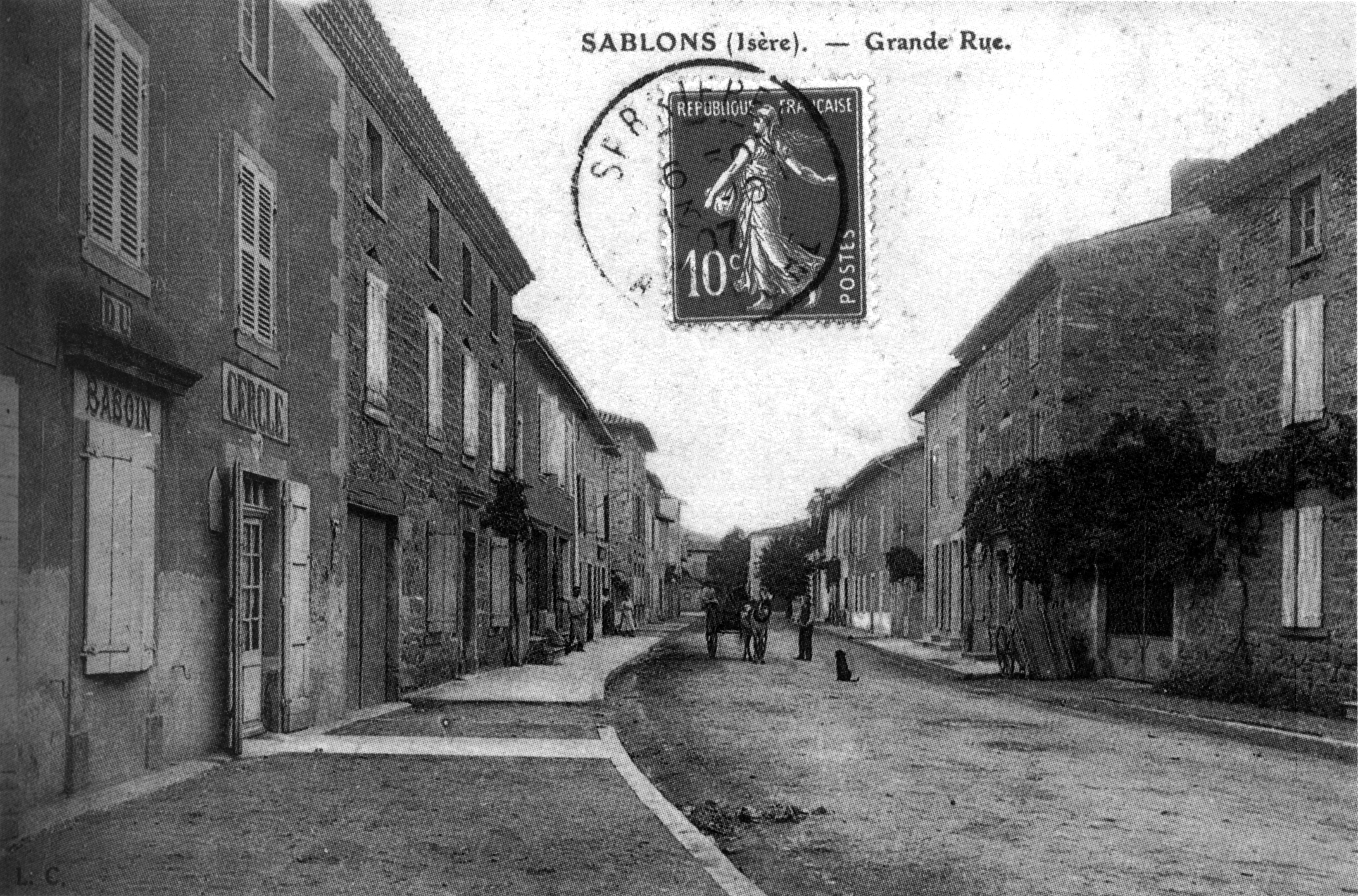 Sablons, Grande Rue en 1907